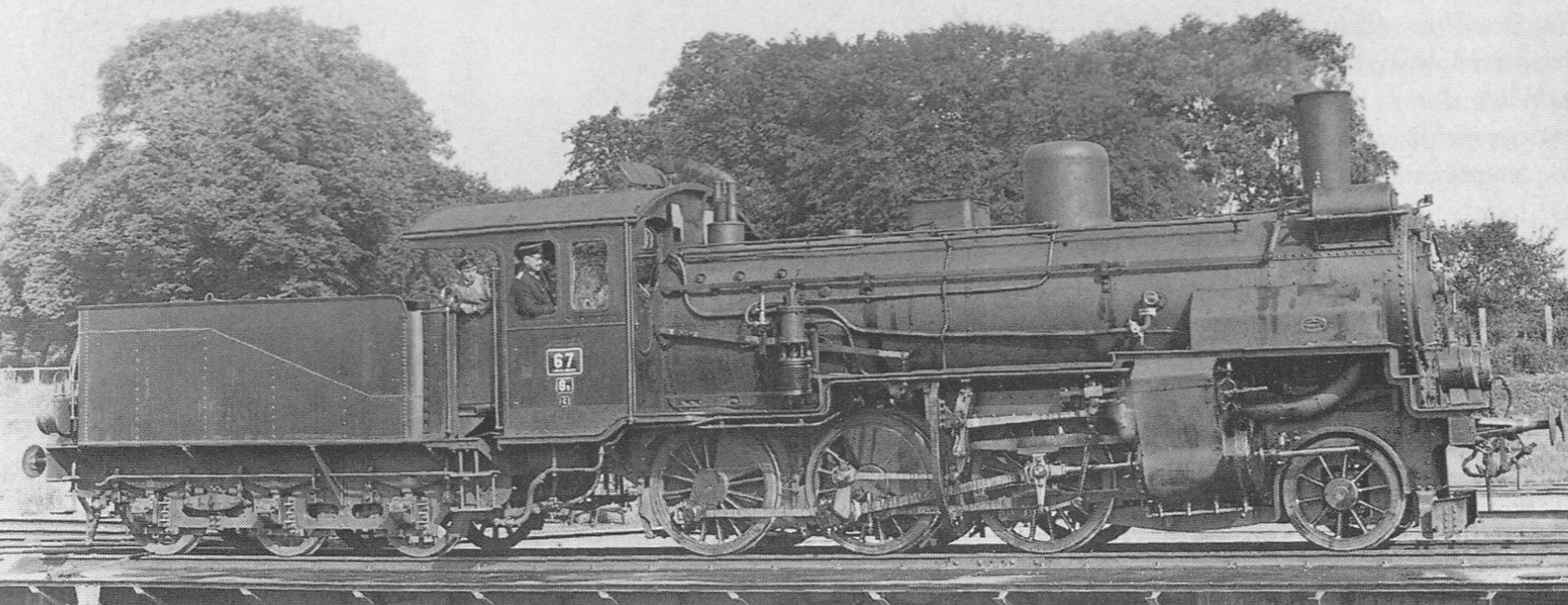 Damplokomotive der Bauart G 5 der Lübeck-Büchener Eisenbahn, Nr. 67